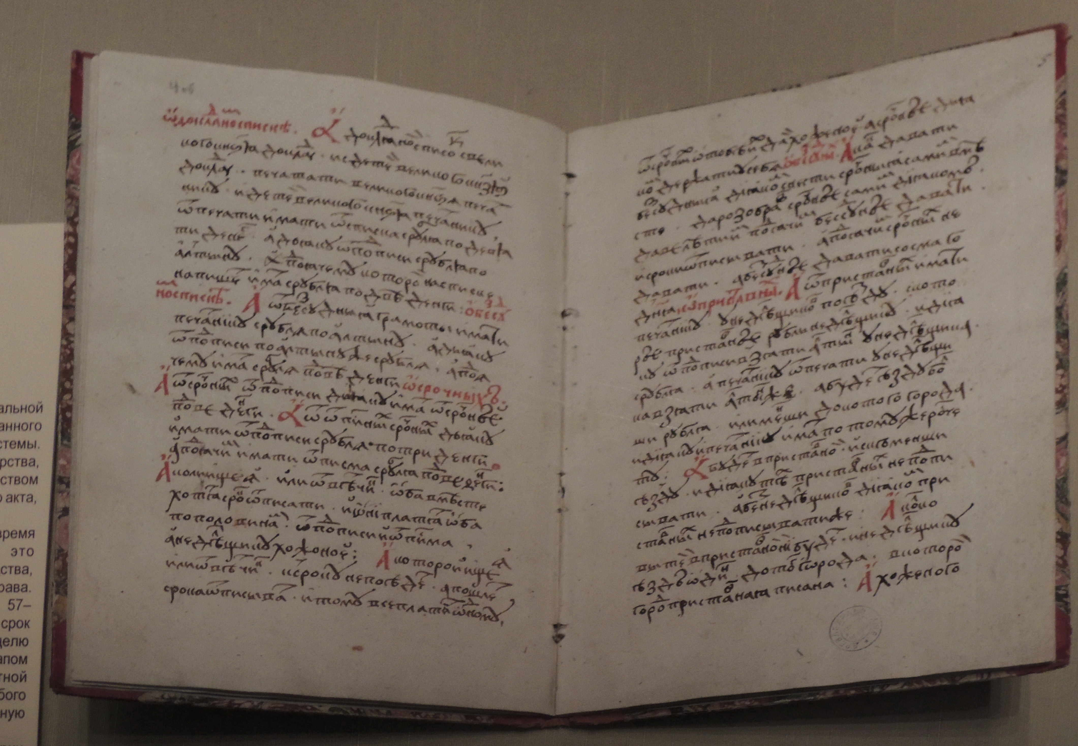 Выставка "Великий князь и государь всея Руси Иван III"